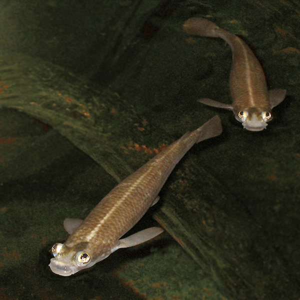 Anableps sp. [Das Vierauge (Gattung Anaplebs)]